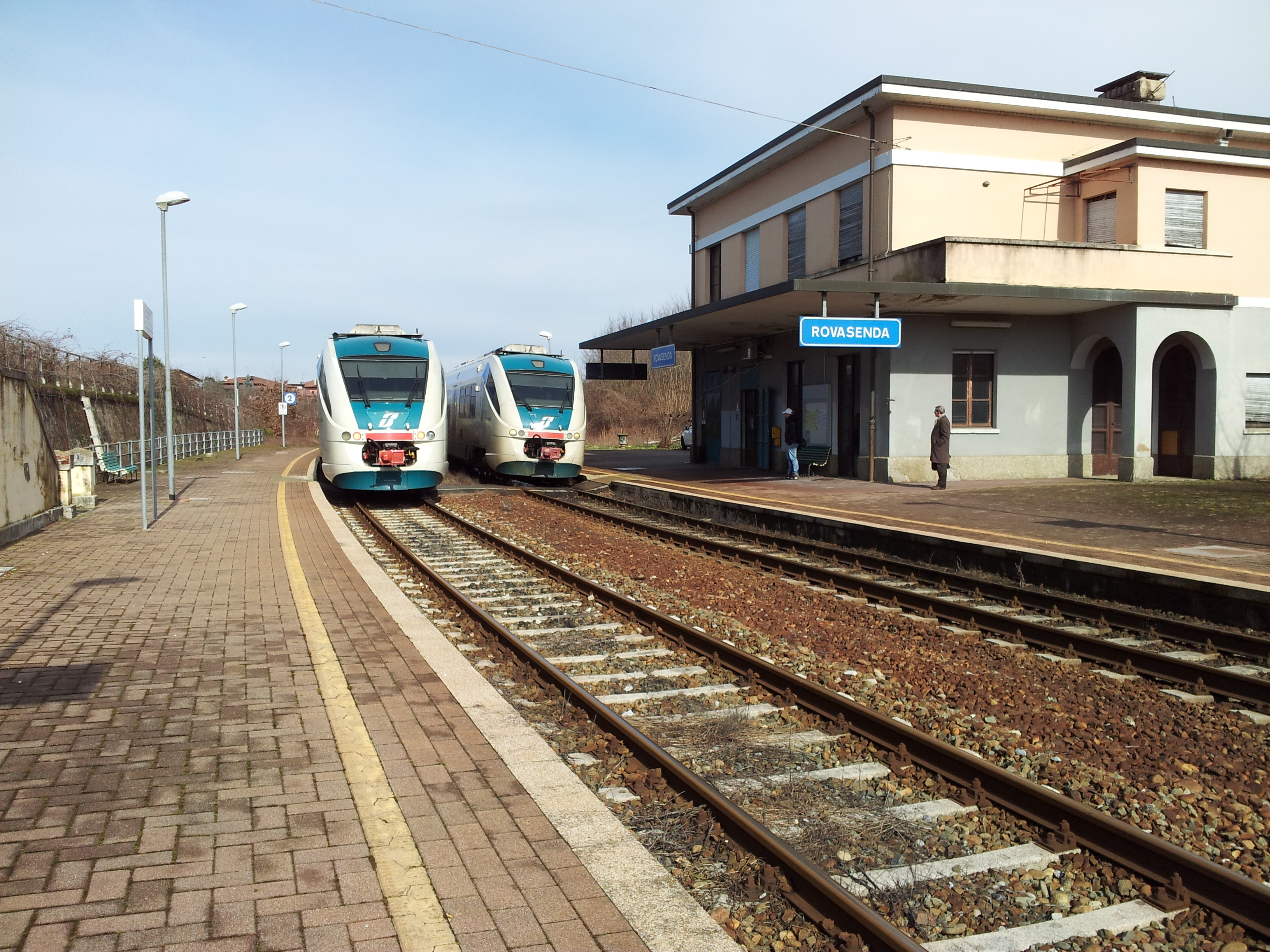 Stazione di Rovasenda, vista del piazzale binari. Sono in sosta due autotreni "Minuetto".